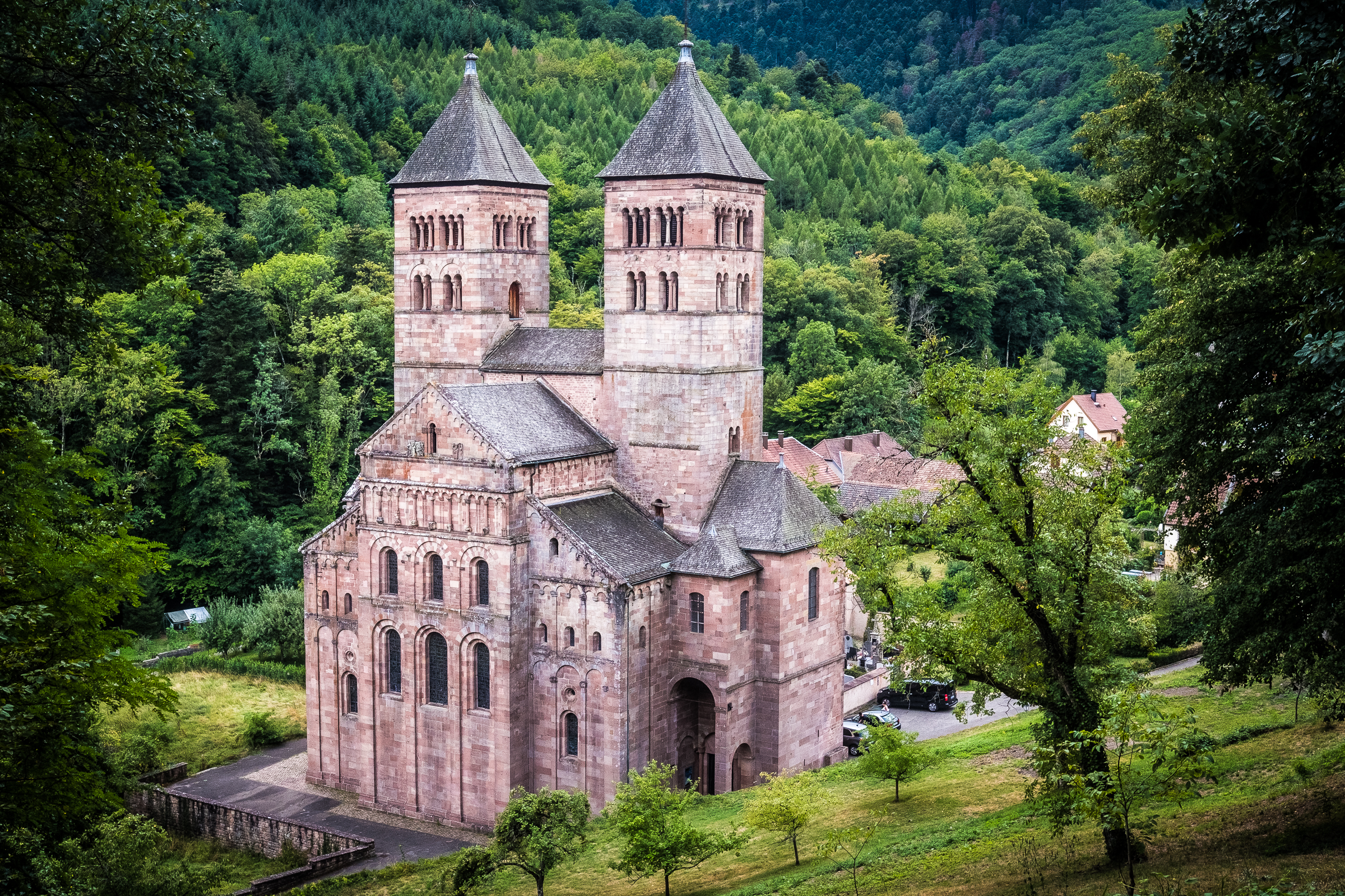 Abbaye de Murbach